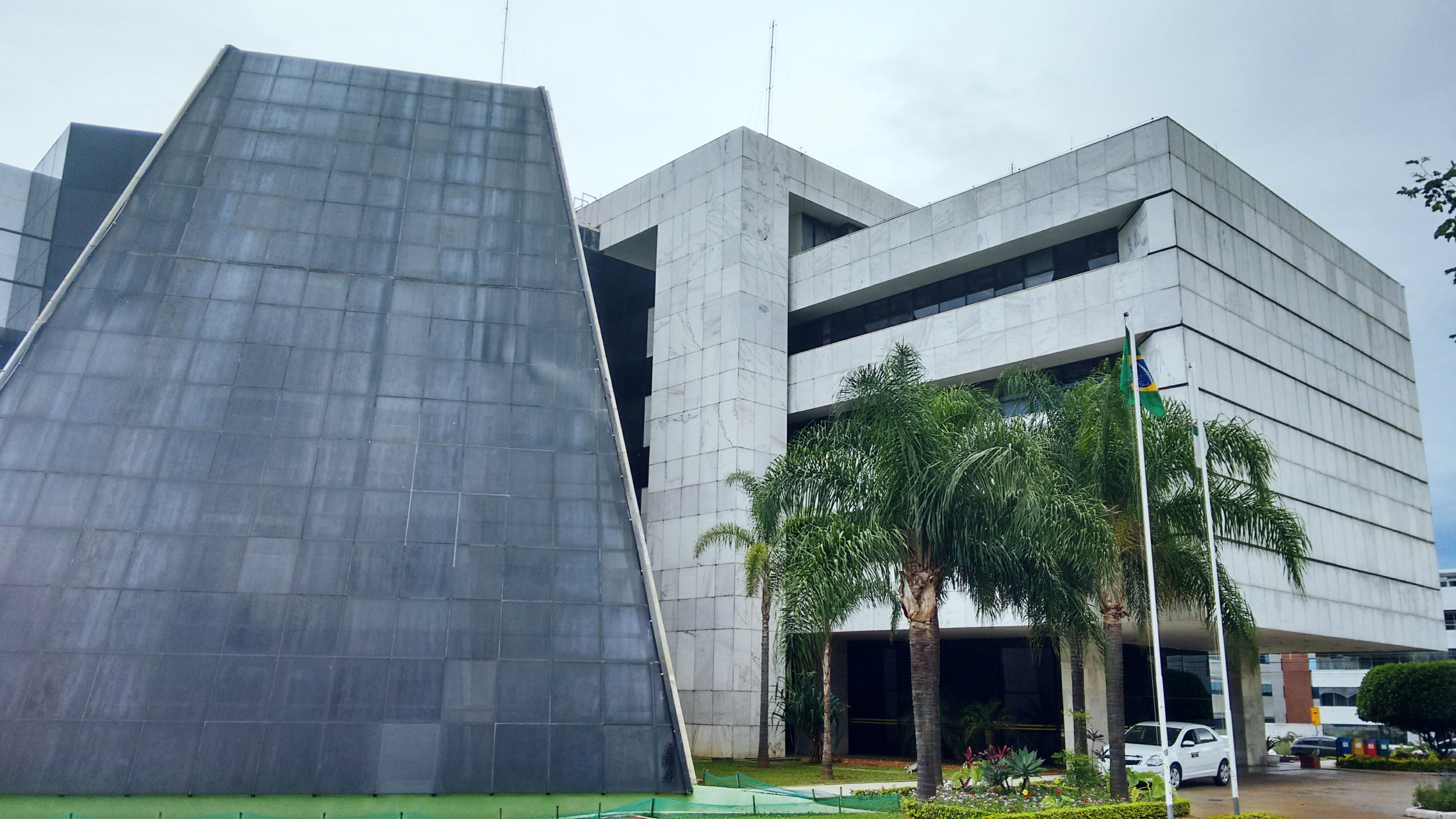 Vista do edifício-sede do Tribunal Regional Eleitoral do Distrito Federal (Brasil)